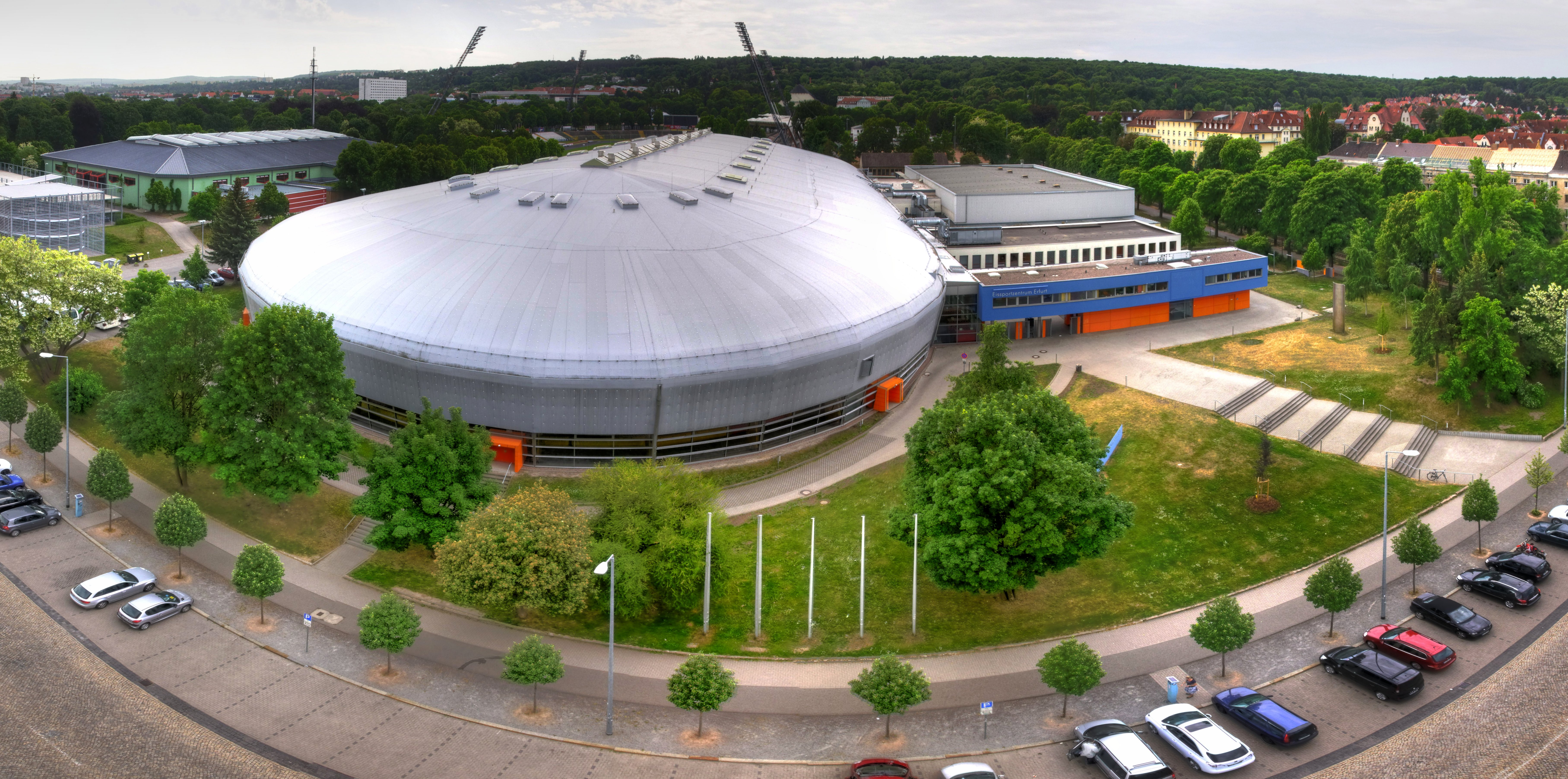 Erfurt-Panorama (Richtung Süden) mit der Eissporthalle